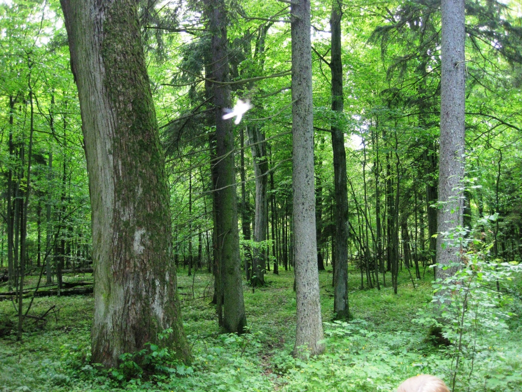 Բելովեժյան անտառում